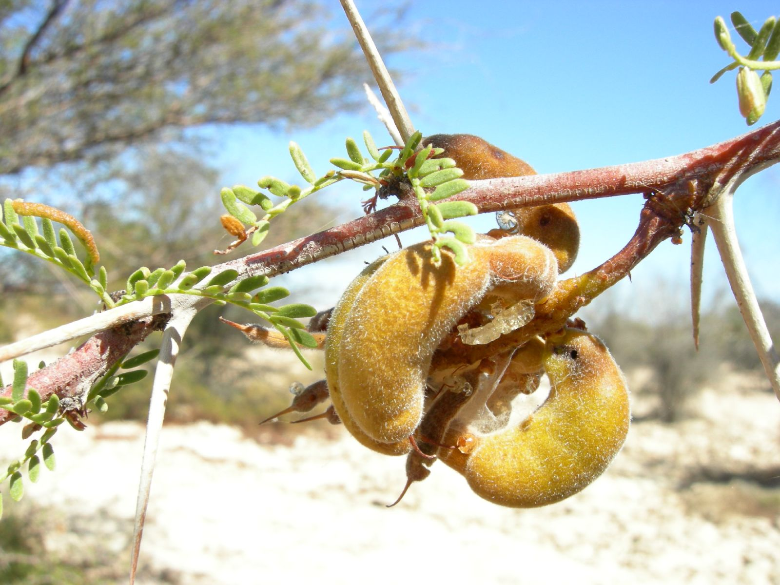 Fruto del Tamarugo (Prosopis tamarugo)